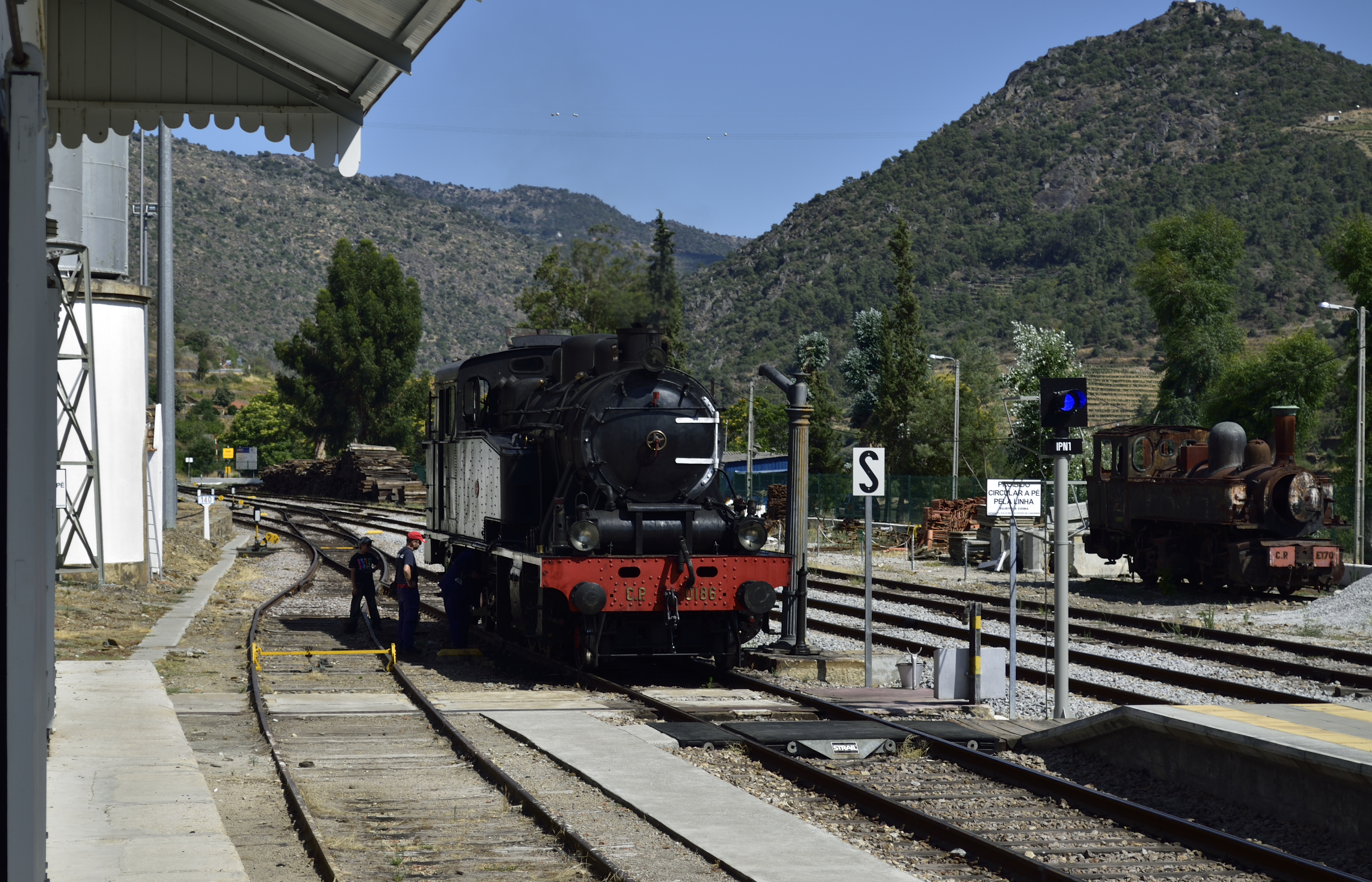 _DSC2662